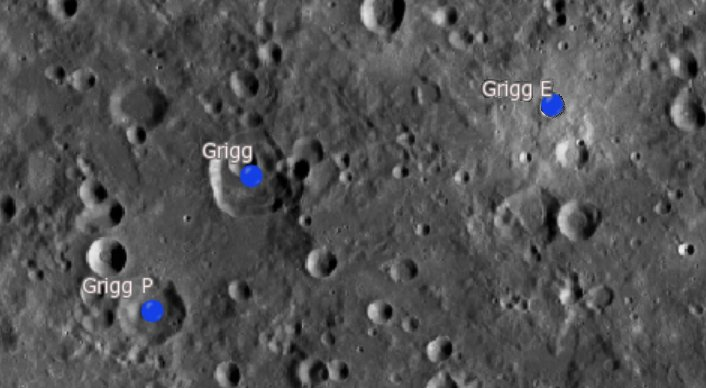 Cráter lunar Grigg. Cráteres satélite. (Imagen LRO)